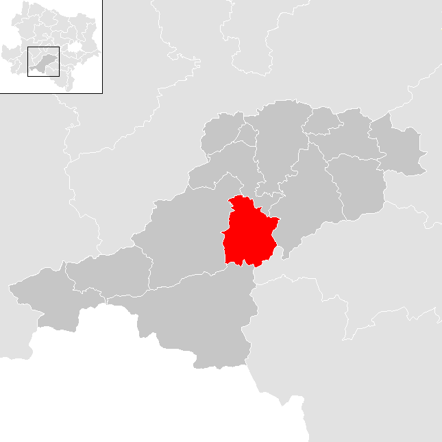 Bezirk Lilienfeld